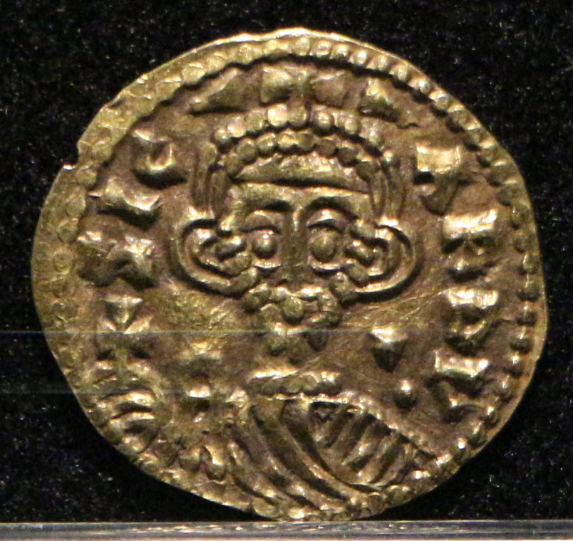 Museo Archeologico Nazionale di Cividale This is a photo of a monument which is part of cultural heritage of Italy.